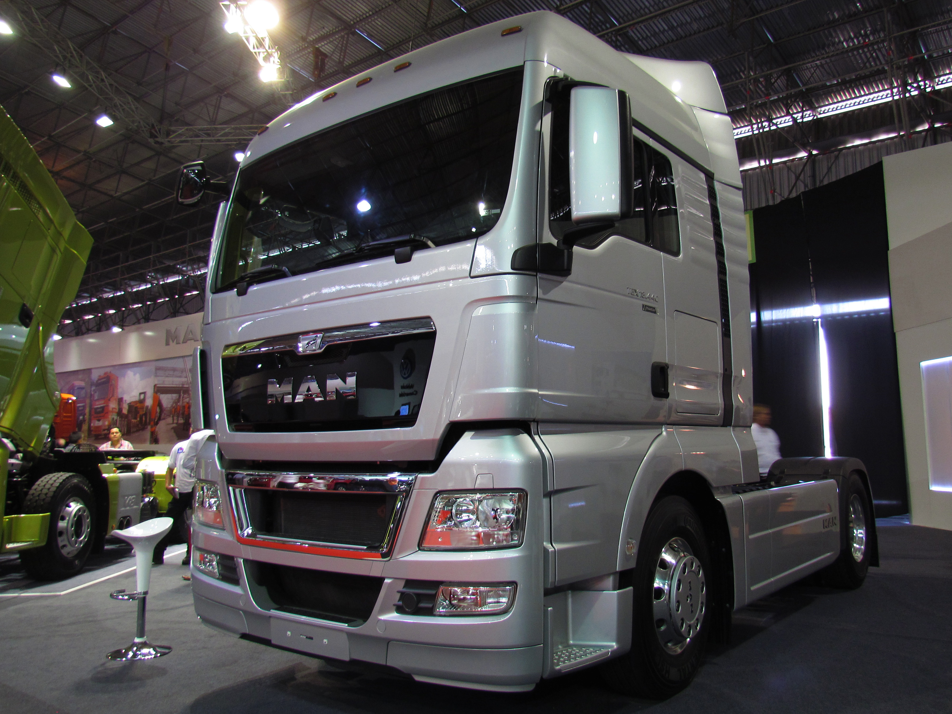 MAN TGX 18.440 2014